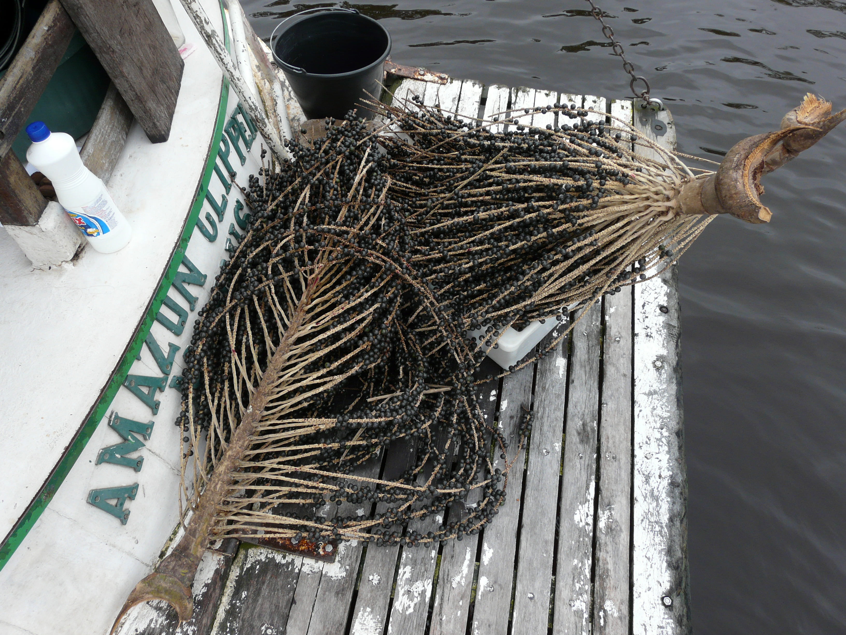 Salat-euterpepalmi (Euterpe oleracea) marjad (assai). Pildistatud aprilli lõpus Rio Negrol Amasoonias.